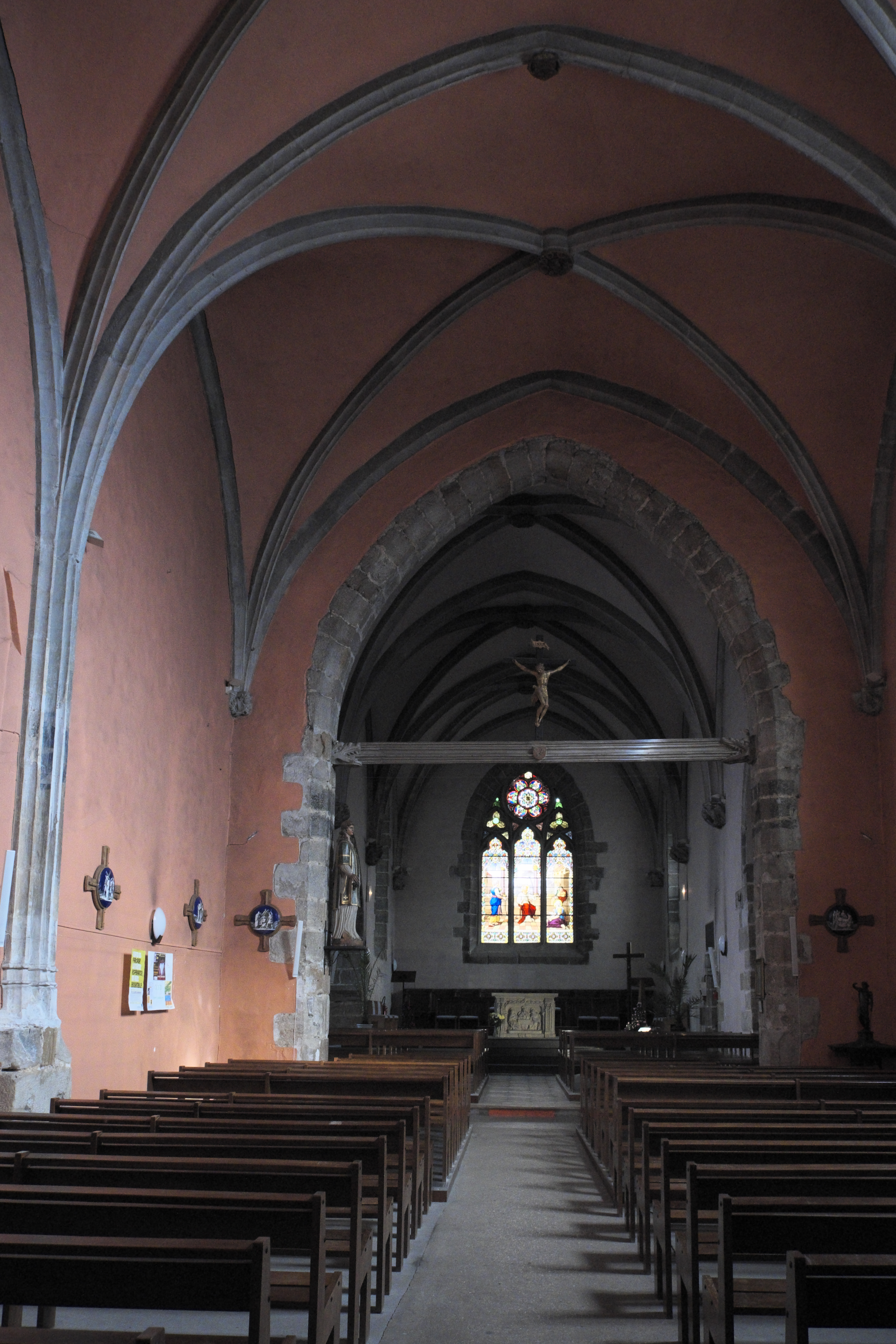 Katholische Pfarrkirche Sainte-Marie-Madeleine in Marcoussis im Département Essonne (Île-de-France/Frankreich), Innenraum